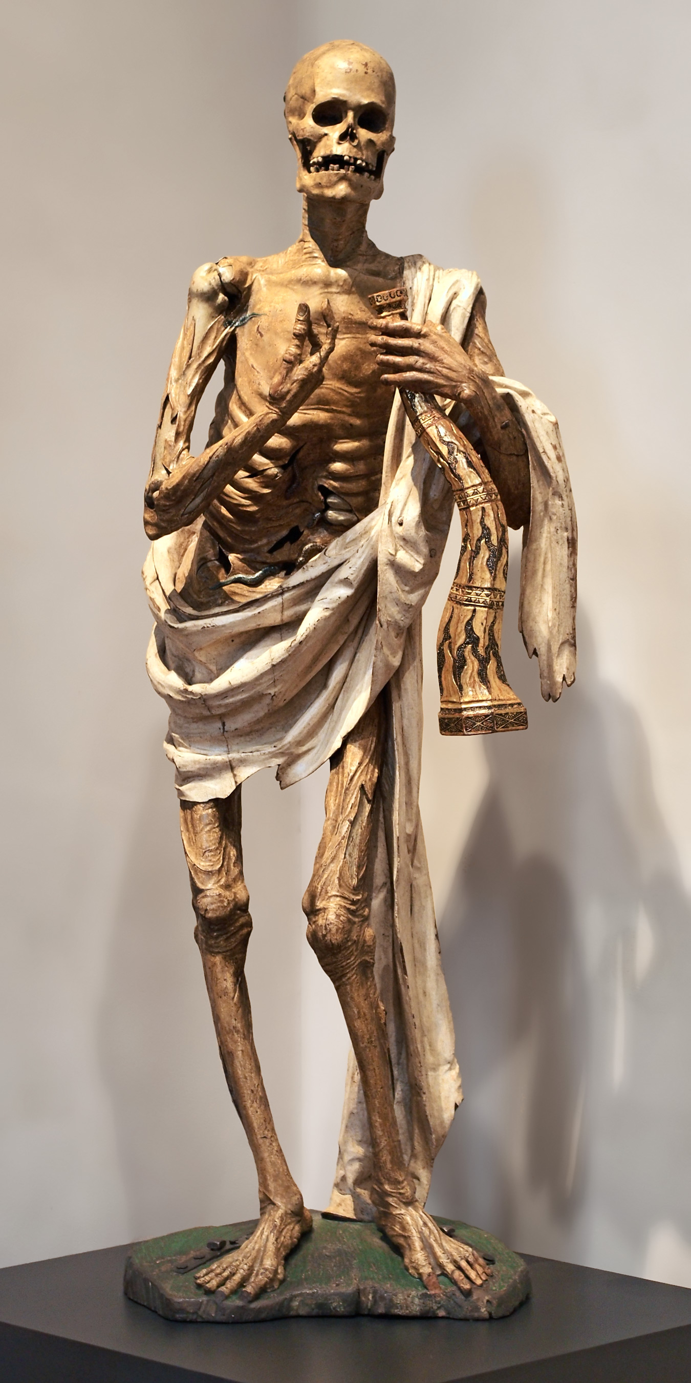 La Muerte, madera policromada, c. 1522. Gil de Ronza (c. 1483 - c. 1535). Museo Nacional de Escultura, Valladolid.